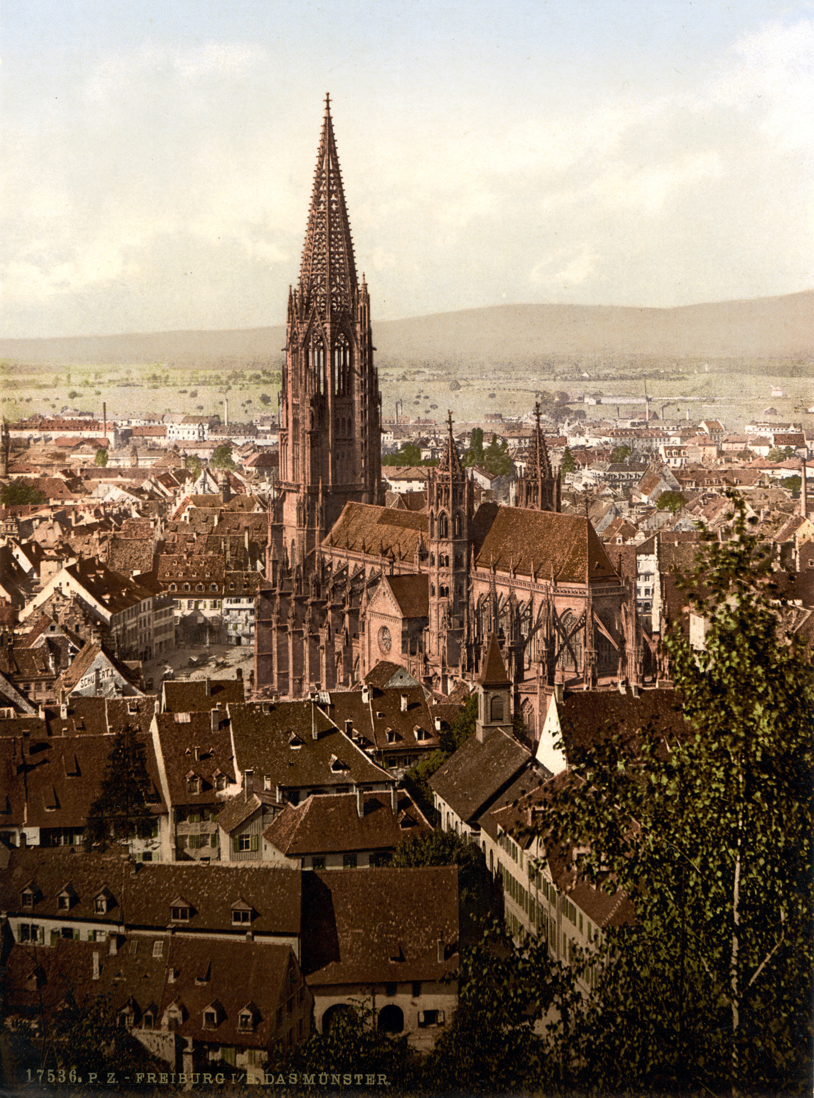 Freiburg Minster, Freiburg, Baden, Germany